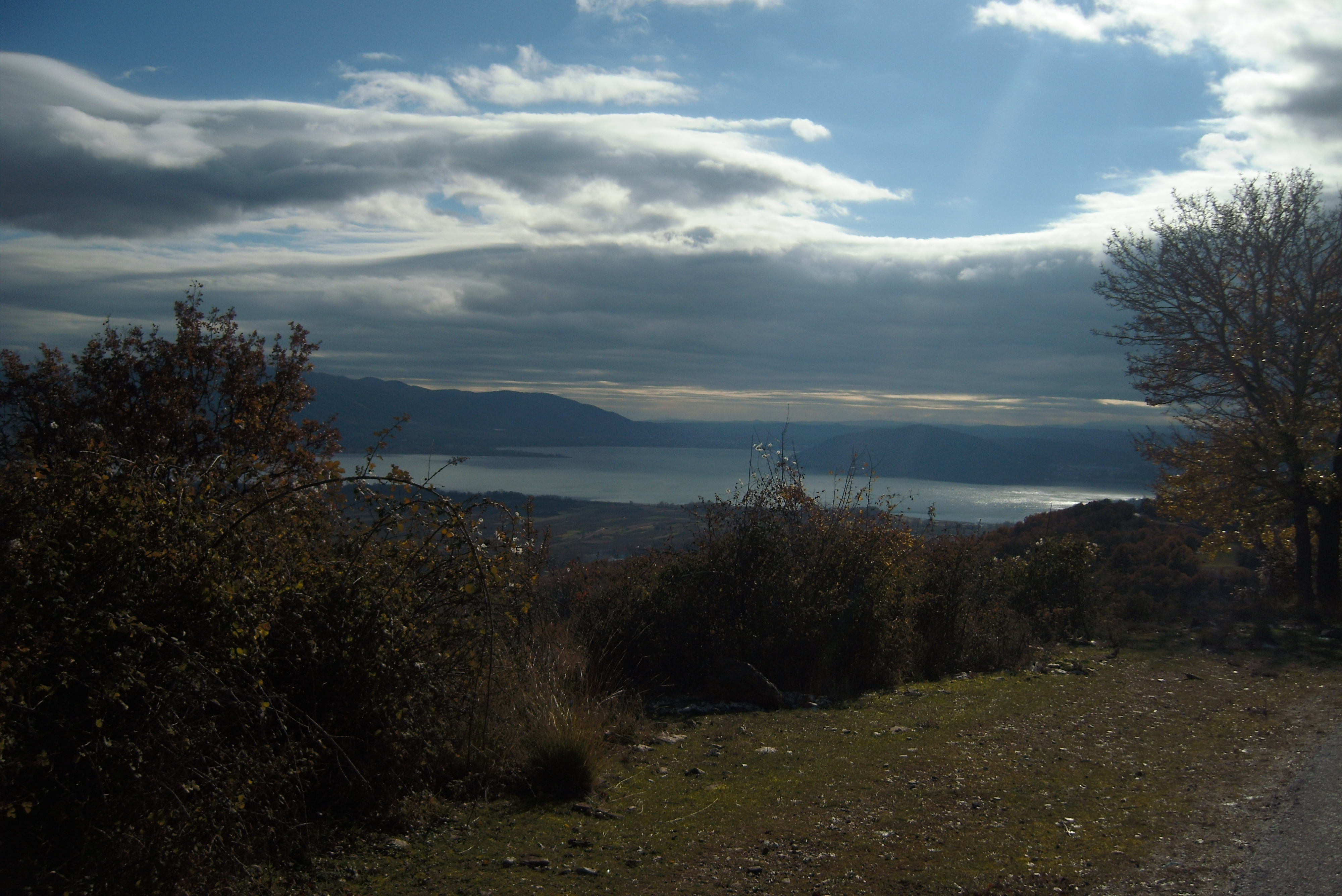 Костурското езеро от пътя Сетома - Шестево